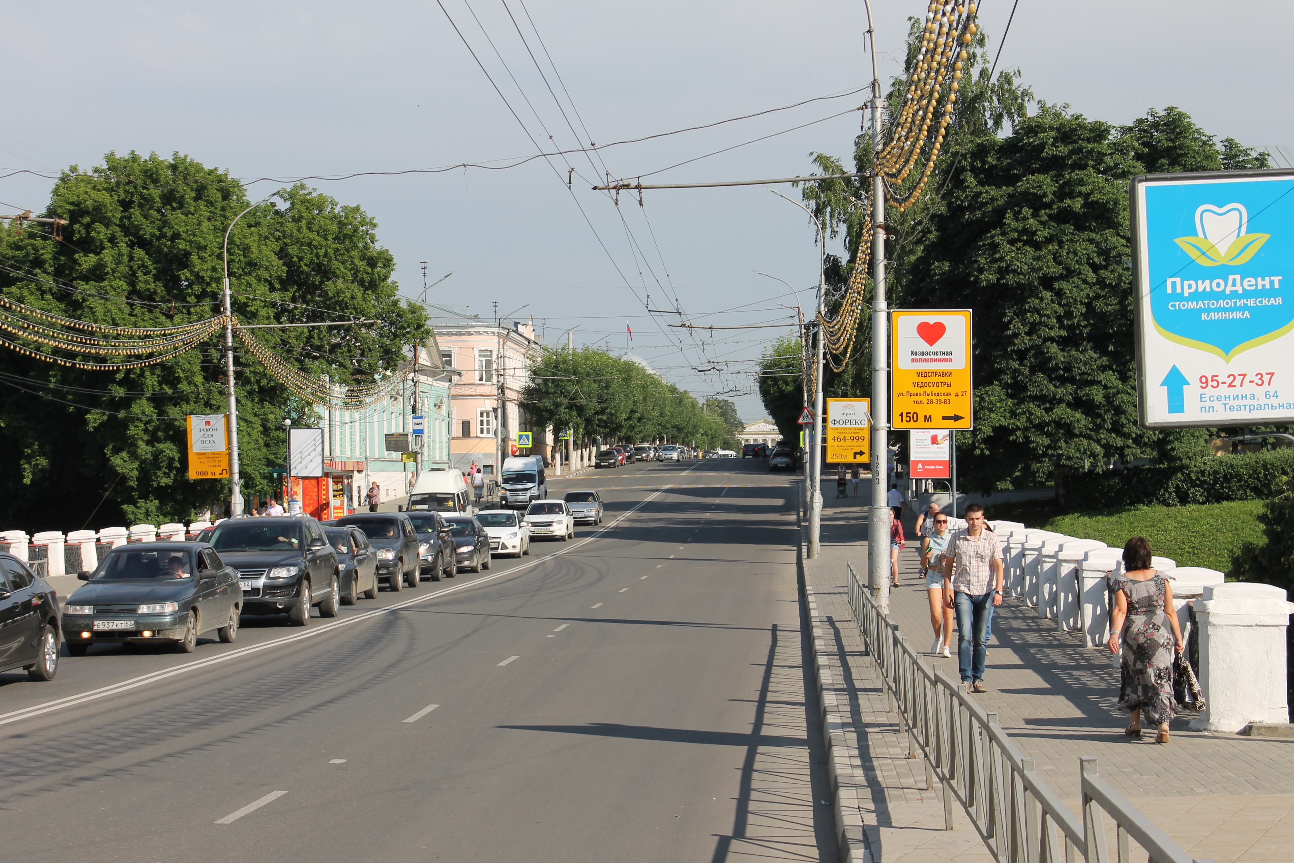 Перспектива улицы Ленина (вплоть до здания областного театра драмы).